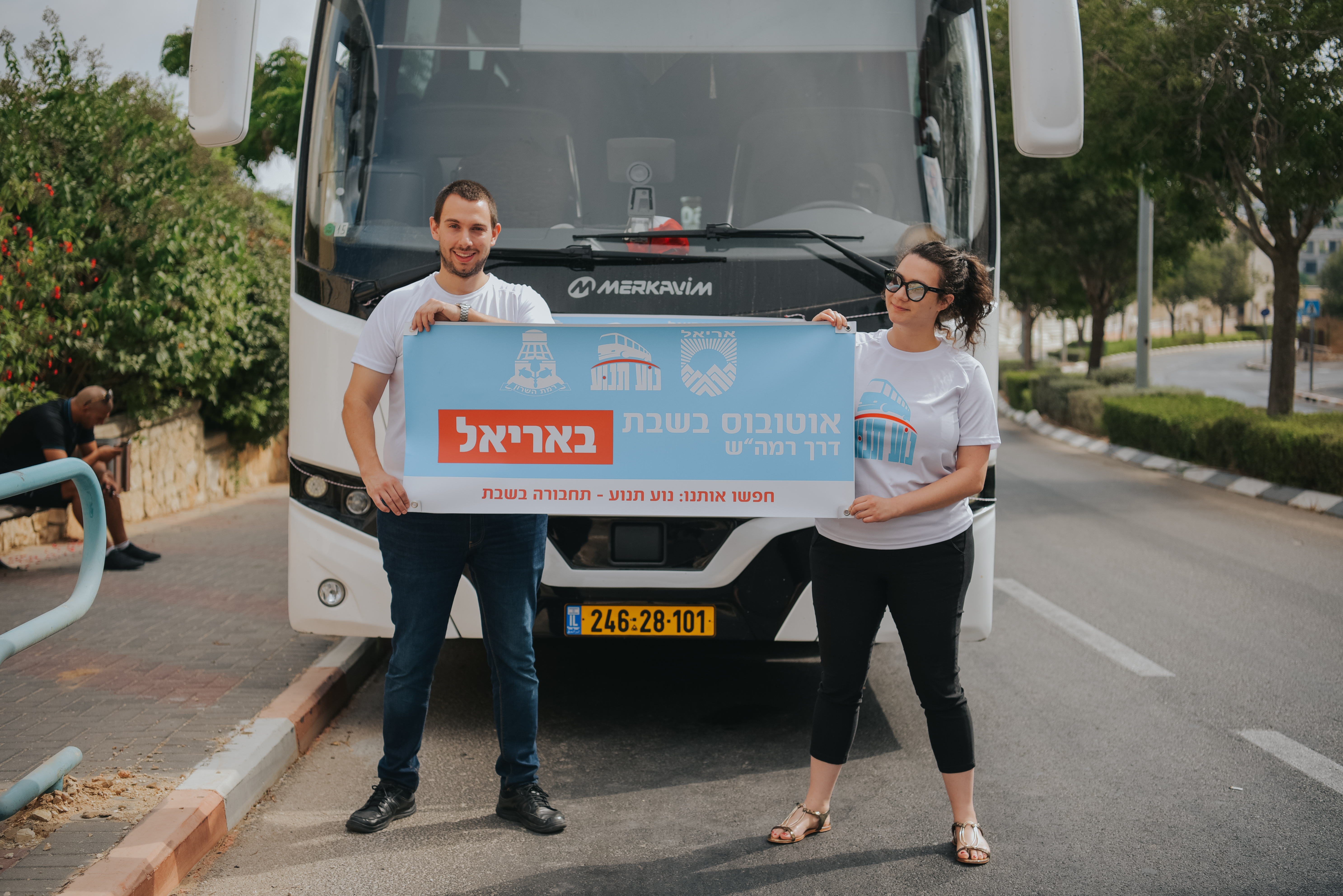 צילום של חזית האוטובוס של נוע תנוע הנוסע בשבת באריאל